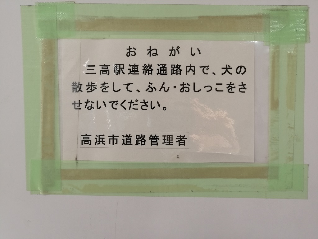 三河高浜駅の連絡通路にある注意書き